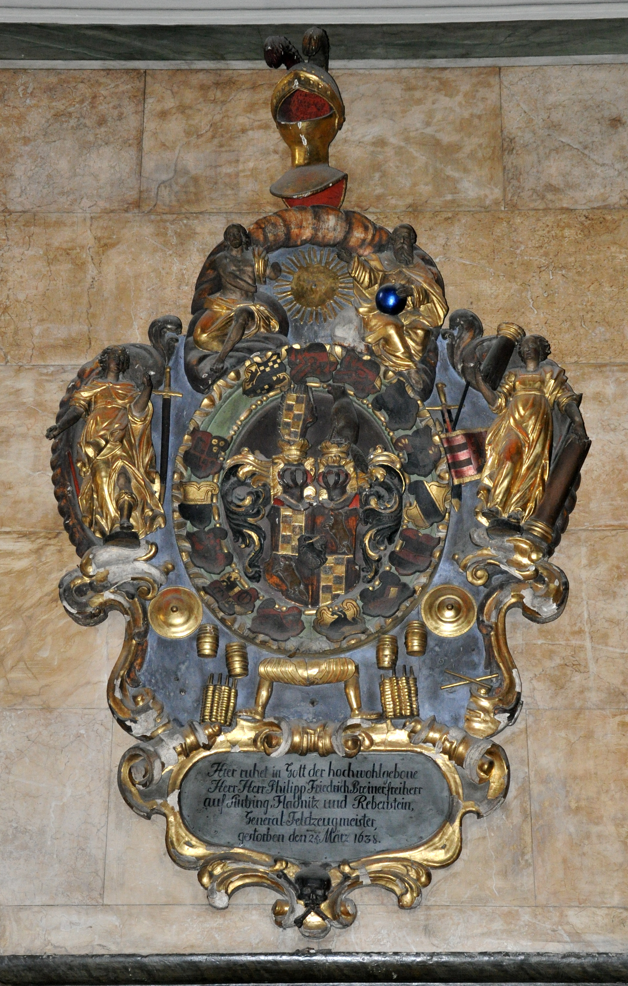 Wien, Schottenkirche, Vorraum, Epitaph Philipp Friedrich Breiner, Freiherr von Aubing, mit Wappen Text: "Hier ruhet in Gott der hochwohlgeborne Herr Herr Philipp Friedrich Breiner, freiherr auf Aubing, Fladnitz und Rebenstein, General-Feldzeugmeister, gestorben den 25. März 1638"